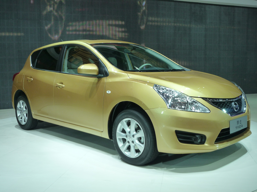 Document destiné à illustrer l'article sur la Nissan Tiida.